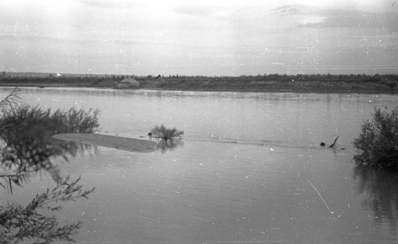 Rumänien, am Pruth, Sommer 1941